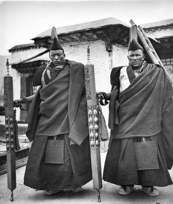 Tibetexpediton, Polizeigeneräle Lhasa-Neujahr, Lamapolizeigeneräle [Mönche]